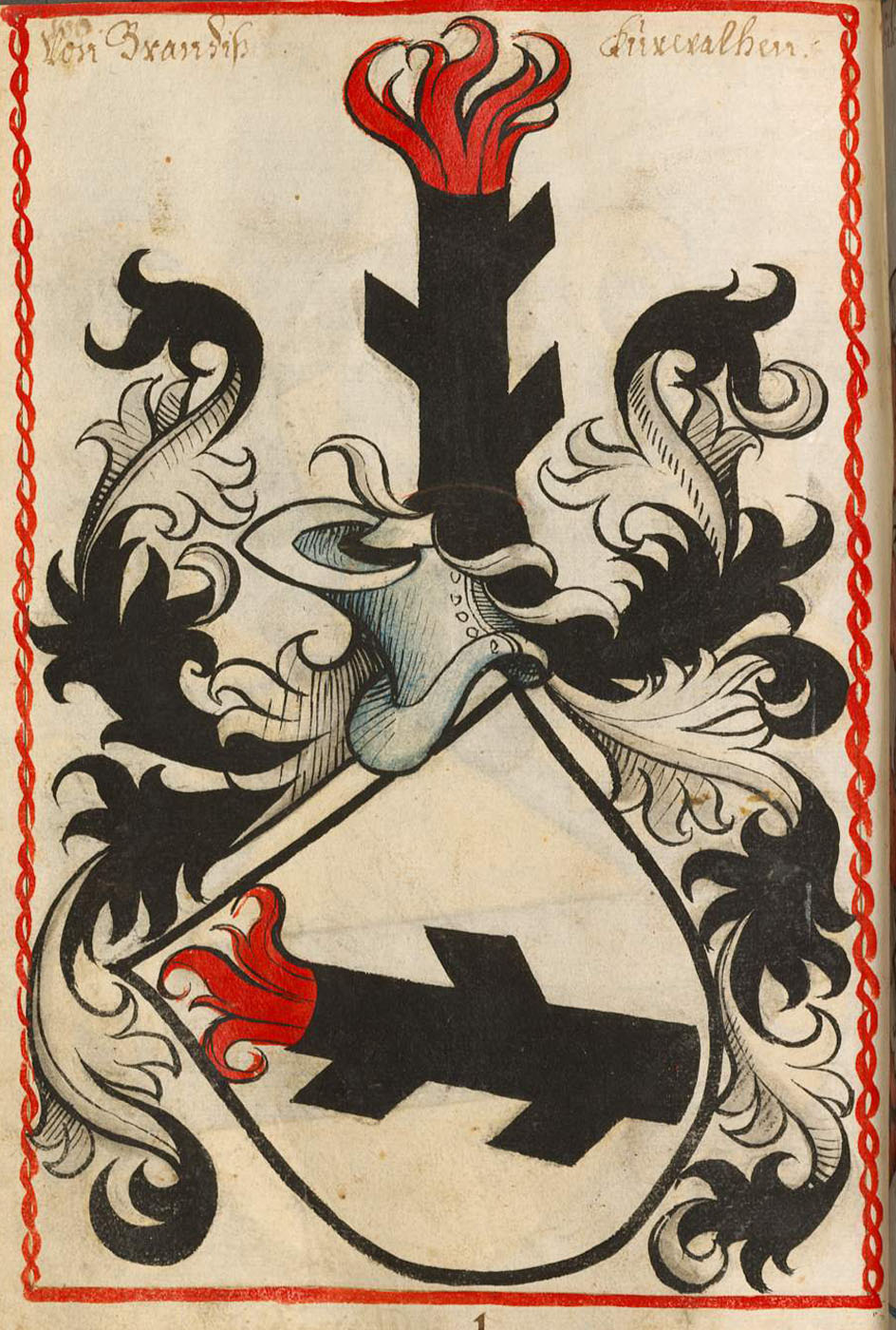 Scheibler'sches Wappenbuch , älterer Teil Brandis